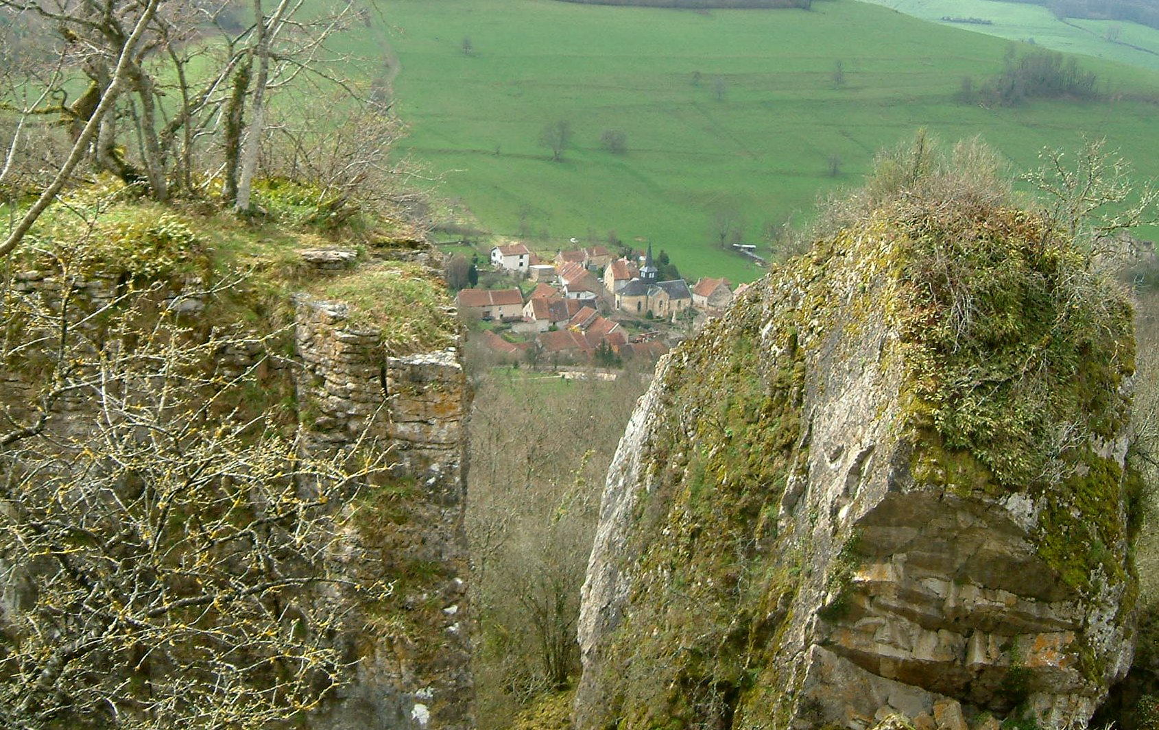 Vue du village de Saffres à travers les falaises.